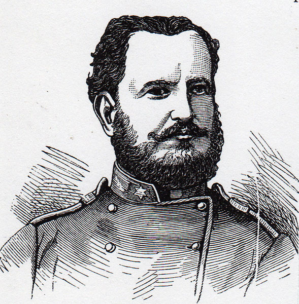 Подполковник Лазар Чолак-Антич